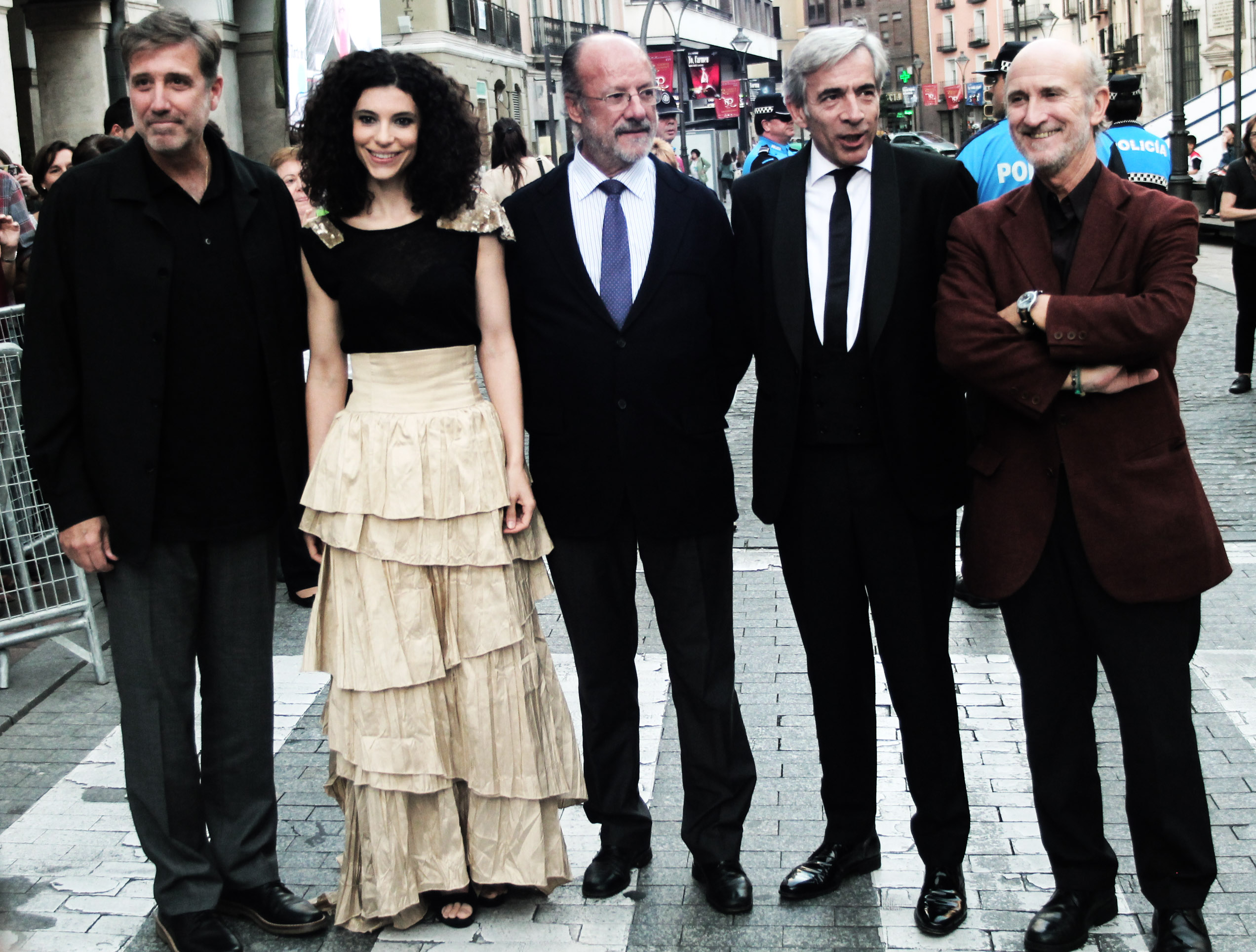 Entrega de la Espiga de Honor a Imanol Arias